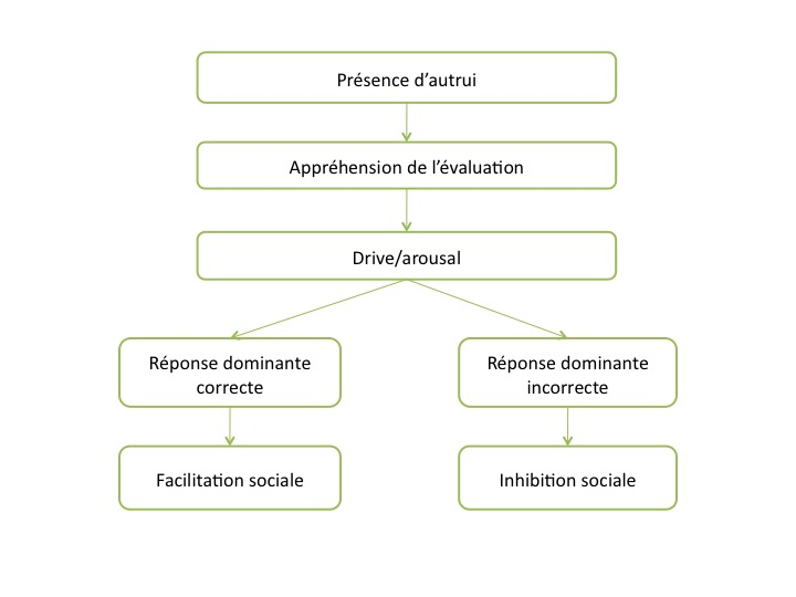 Source : N. Cottrell (1972), Social facilitation, Experimental social psychology. in D. Muller, Facilitation sociale et comparaison sociale : de la menace de l'auto-évaluation à la focalisation attentionnelle, U.F.R Science de l'Homme et de la Société, 2002 Reproduction personnelle